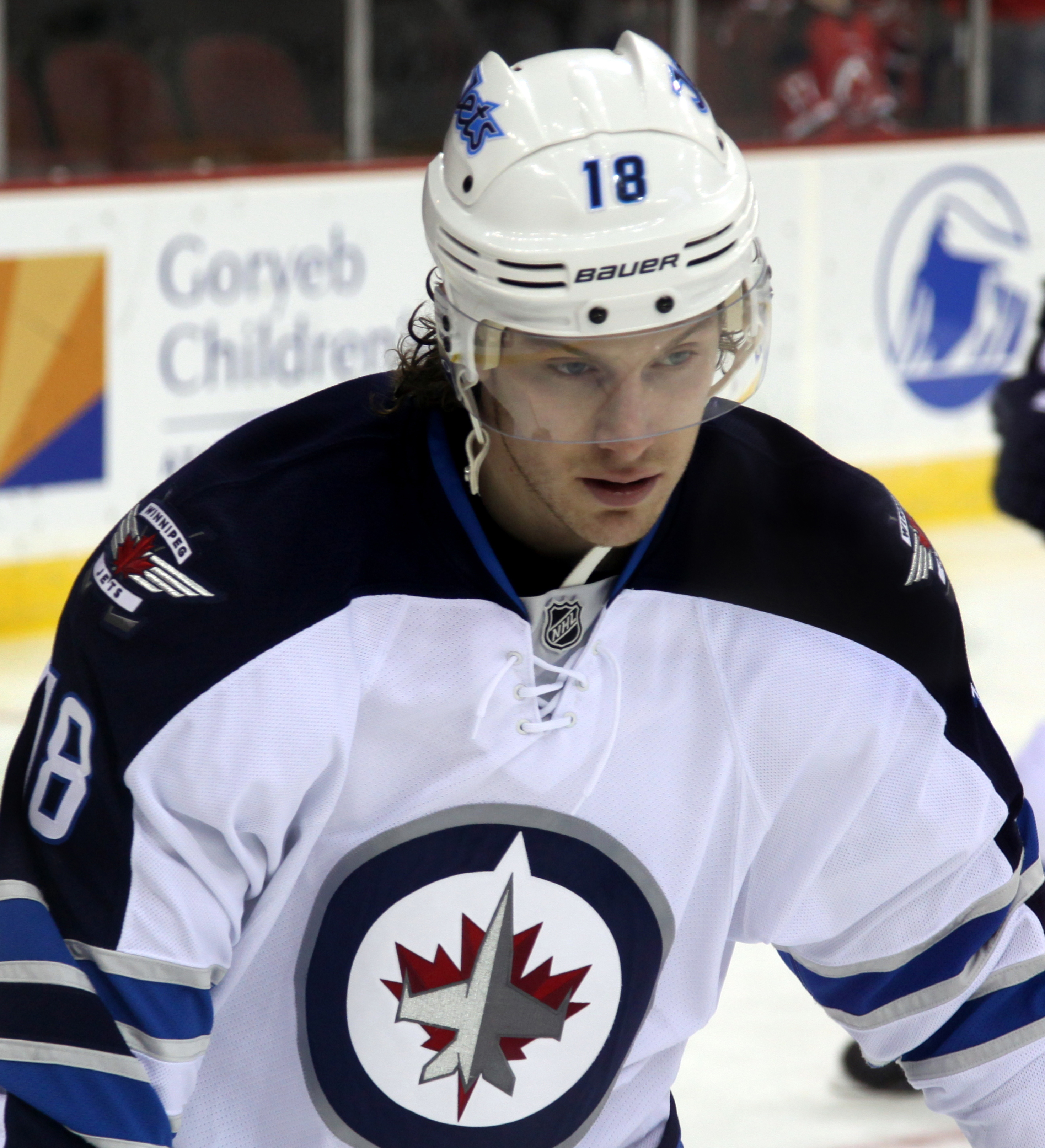 Little in 2013.